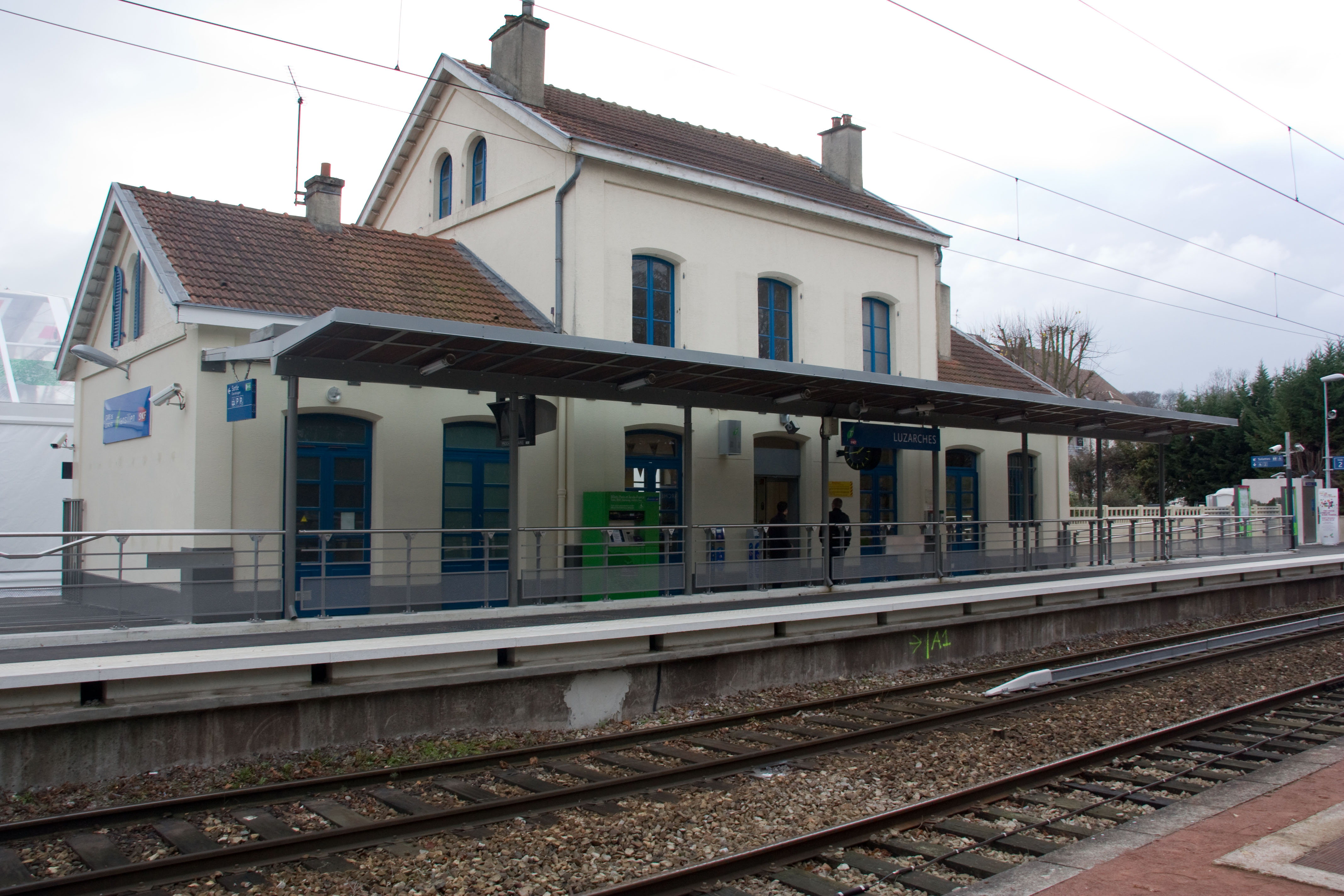 Gare de Luzarches